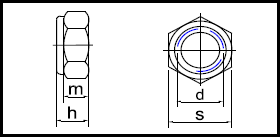 ISO 10511